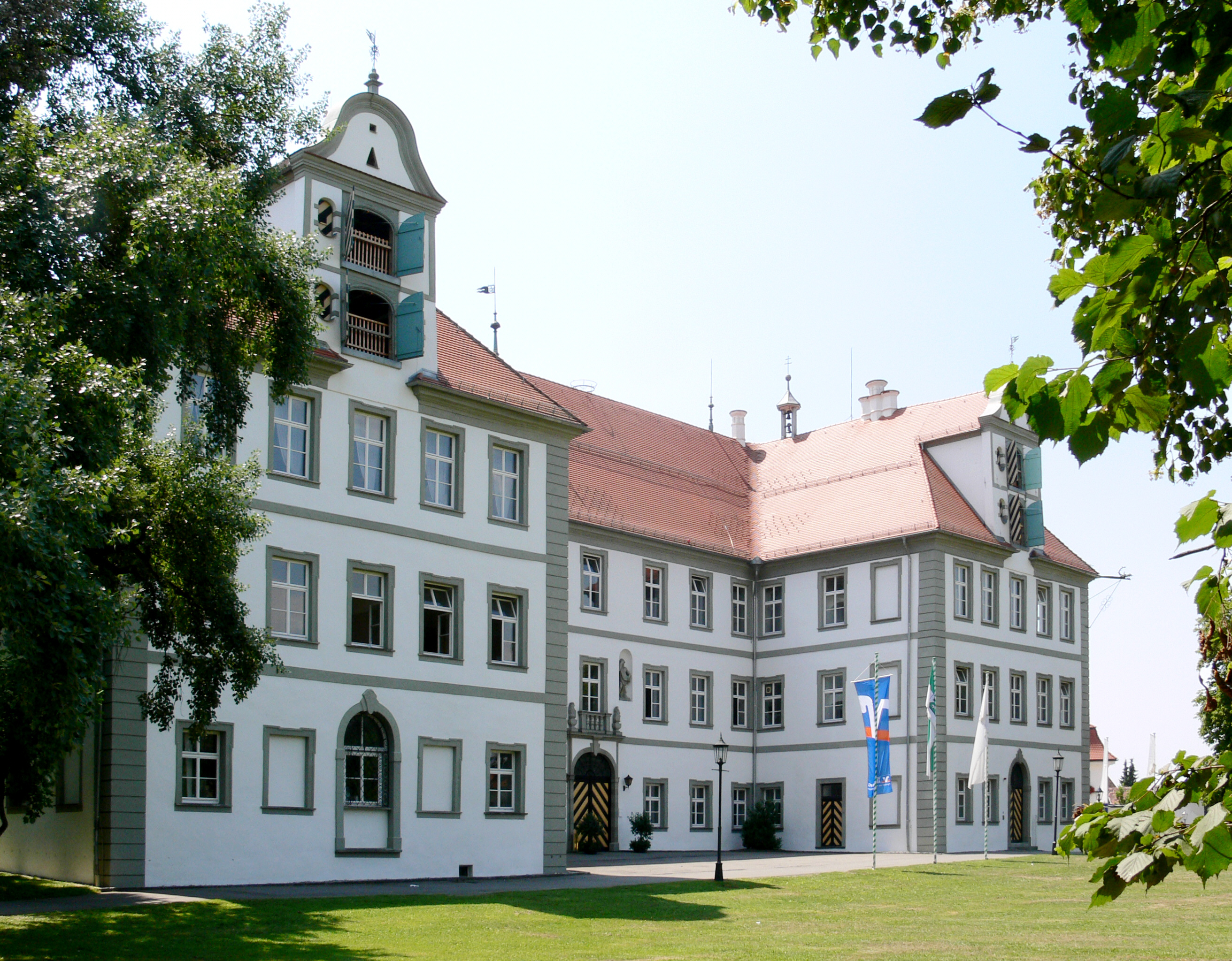 Neues Schloss Kißlegg, Kreis Ravensburg, Baden-Württemberg, Deutschland